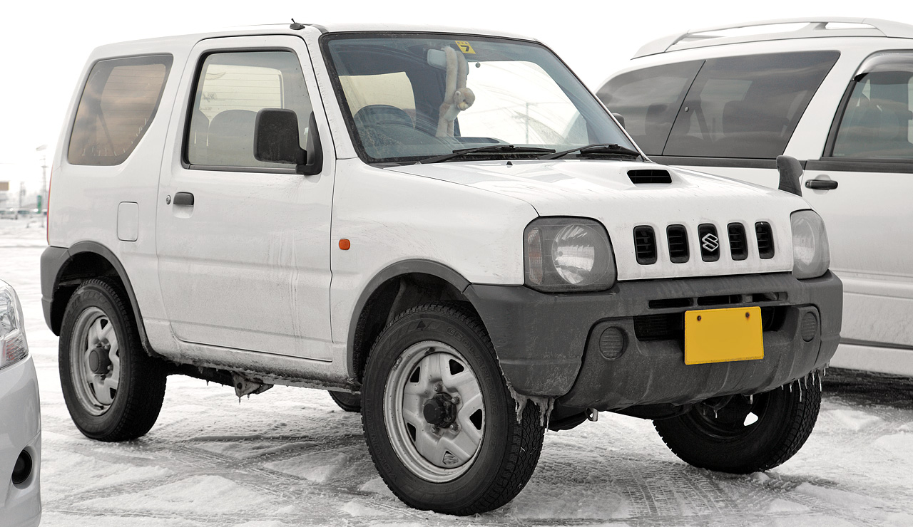 Suzuki Jimny 660 XA